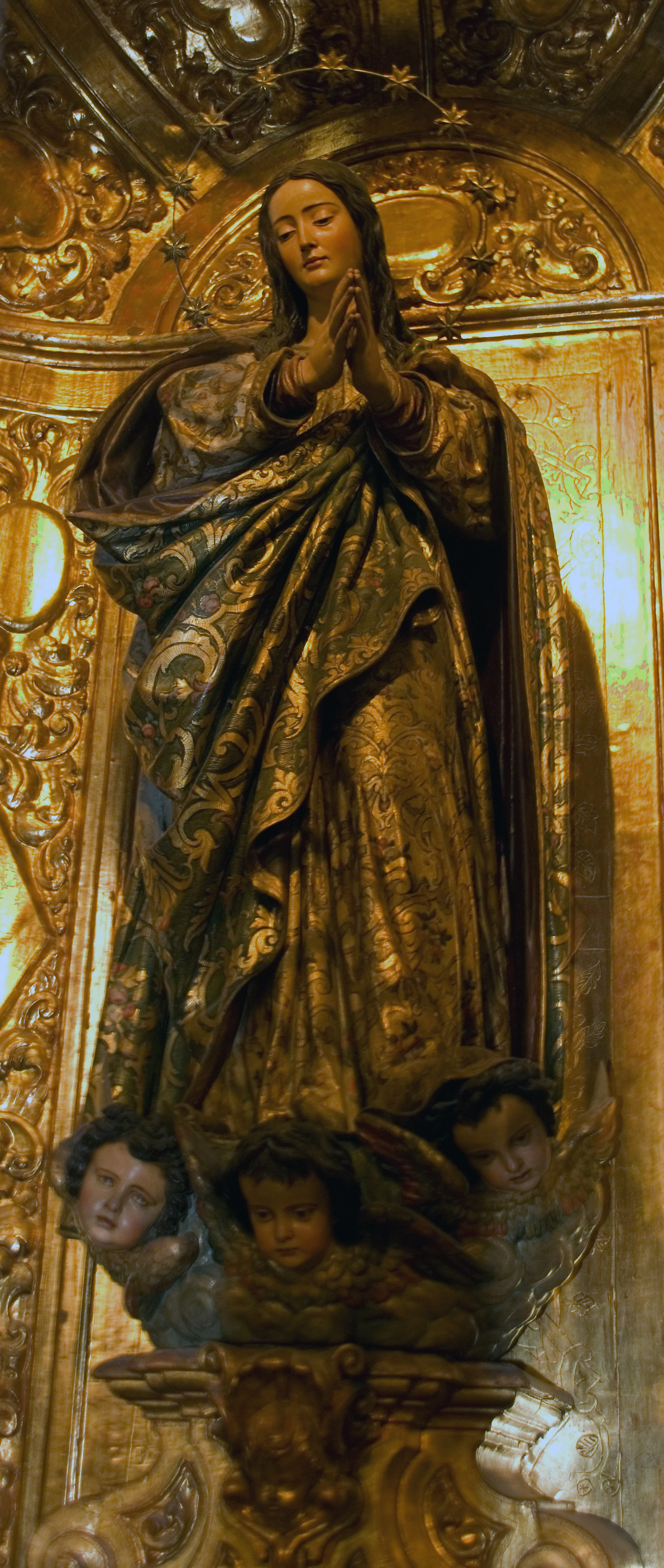 Inmaculada, (La Cieguecita) (1629-1631), autor: Juan Martínez Montañés, Catedral de Sevilla